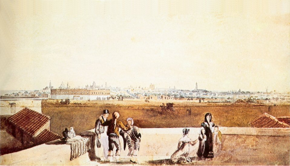 Acuarela pintada por el marino inglés Essex Vidal desde los cuarteles de Retiro, en segundo plano hacia la izquierda se ve la Plaza de Toros, y hacia el fondo el centro de Buenos Aires.